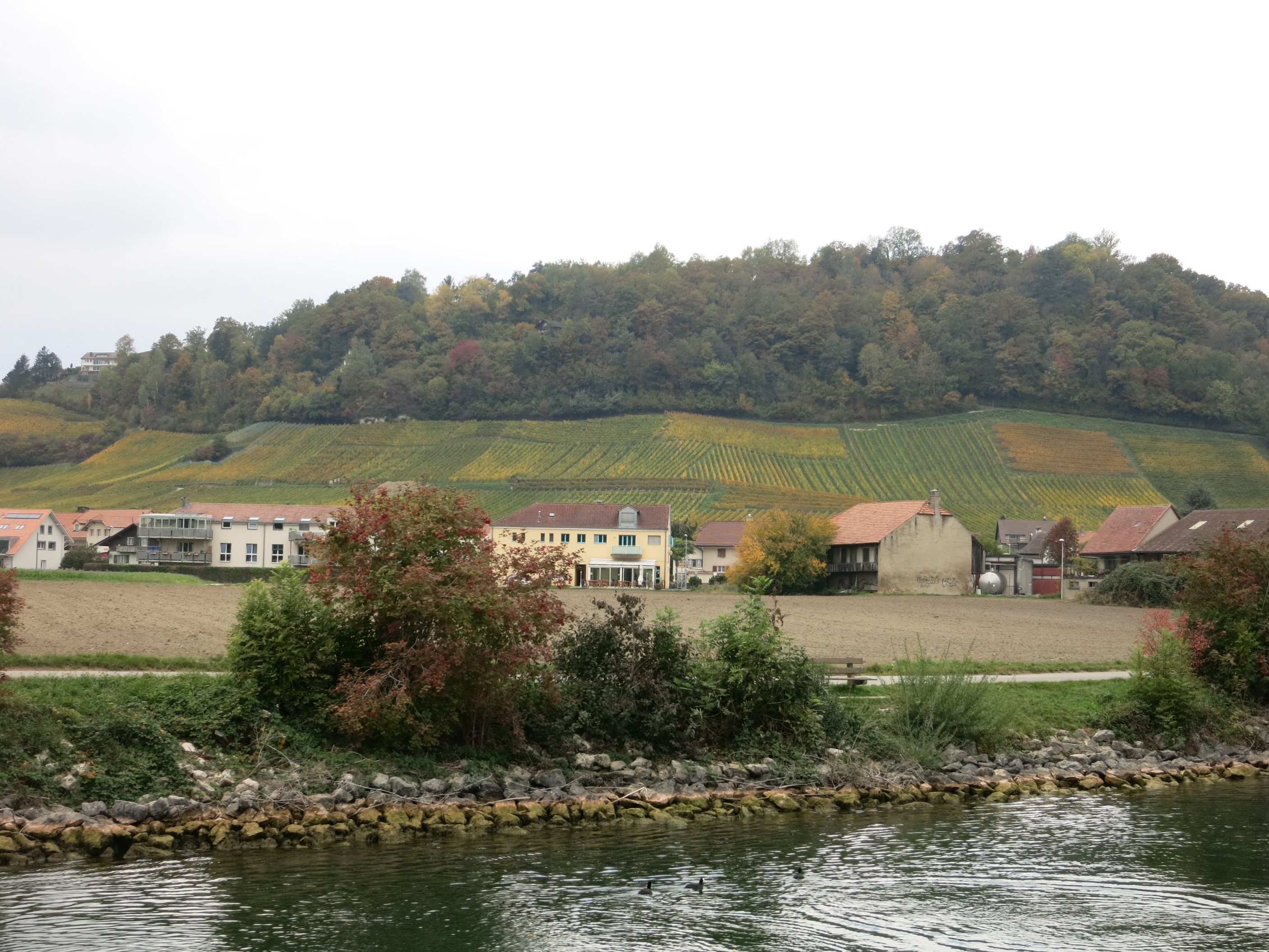 Broyekanal, Sugiez FR, Schweiz